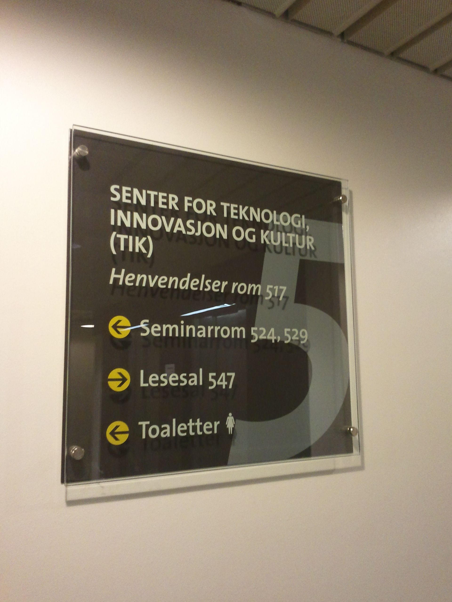 Senter for teknologi, innovasjon og kultur (TIK) ved Universitetet i Oslo.